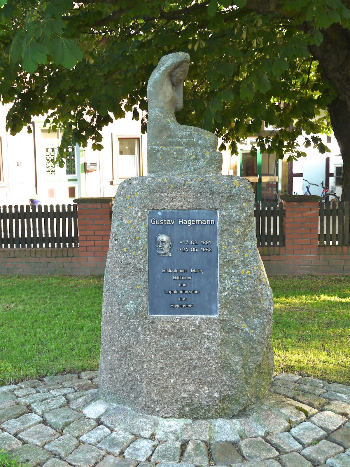 Denkmal für den Maler, Bildhauer und Lapplandforscher Gustav Hagemann (1891 - 1982)